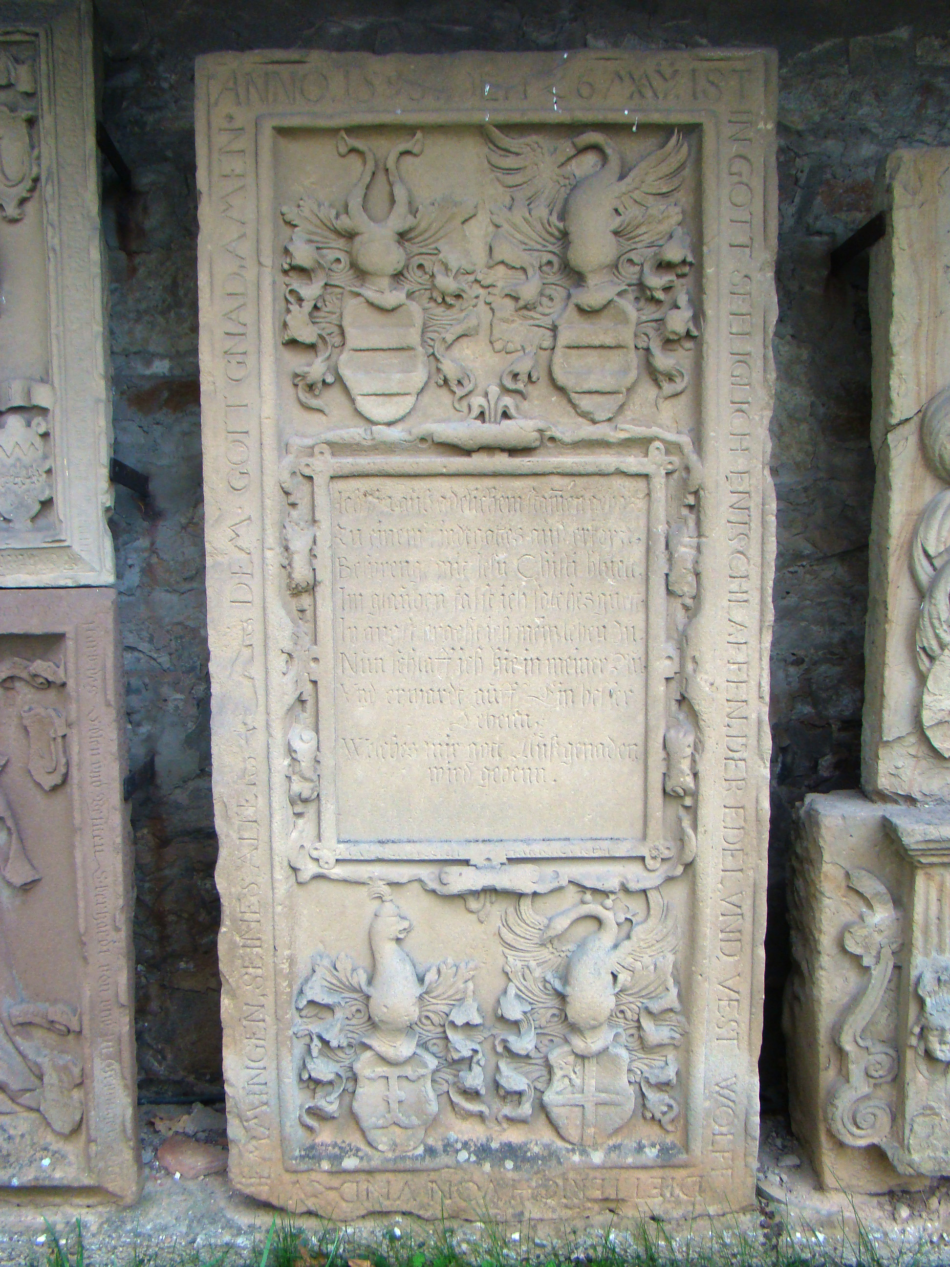 Historische Grabmale beim Unterschloss Gemmingen: Wolf Dietrich von Gemmingen († 26. Mai 1595)